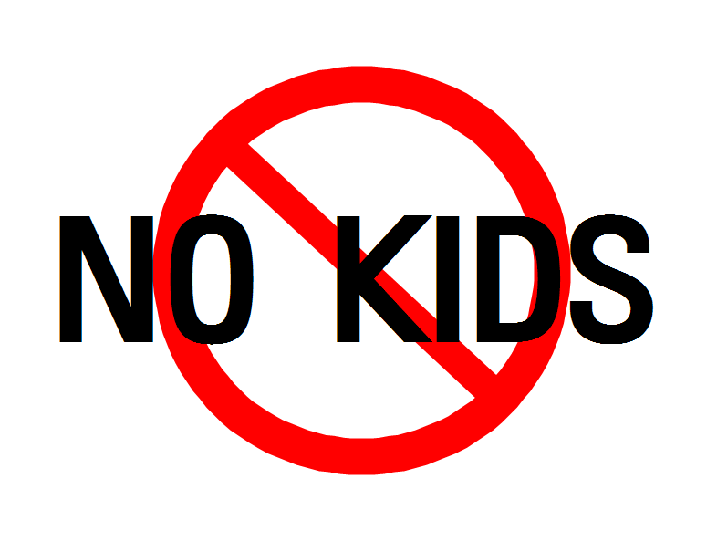 노키즈존을 그림화